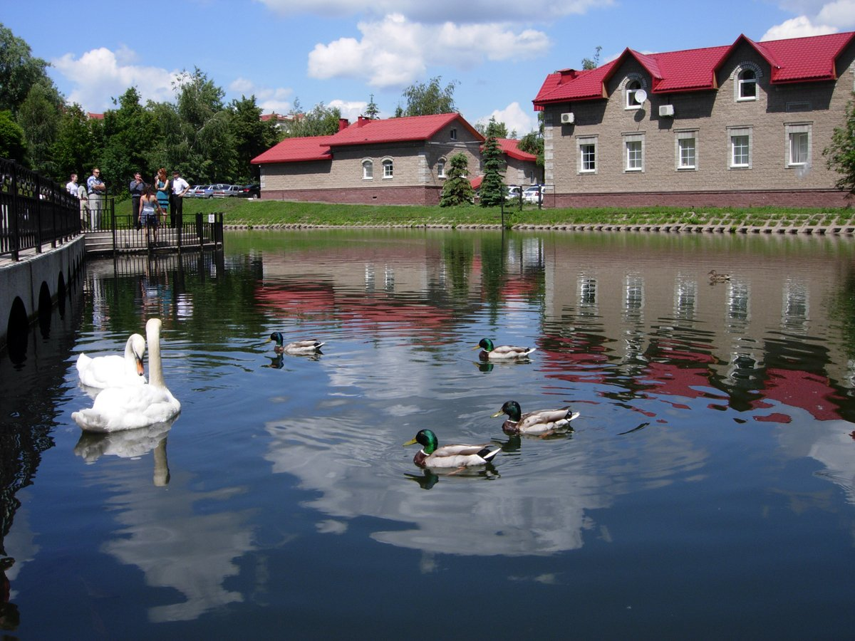 Птицы в озере в саду Аксакова